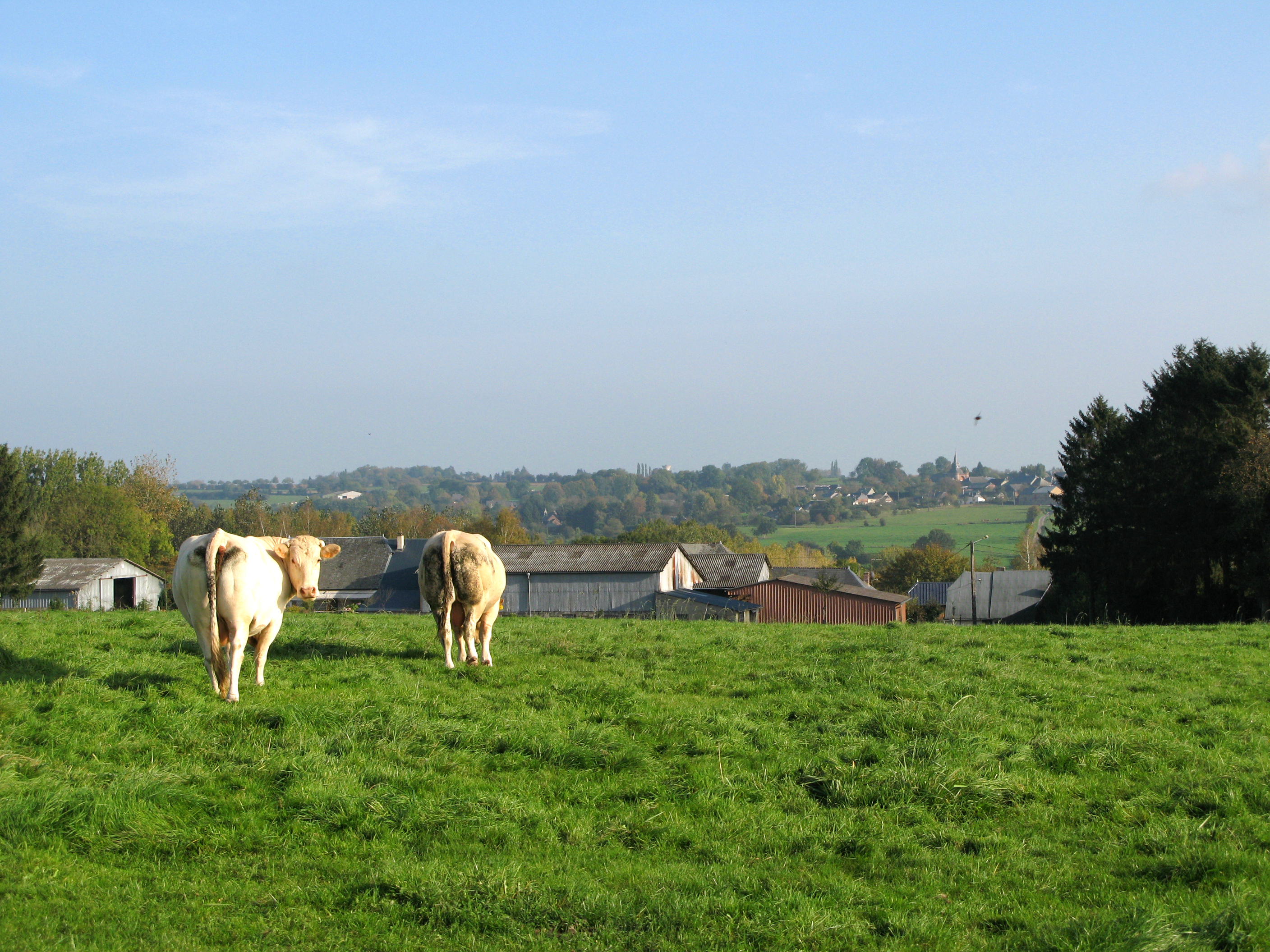 Parfondeval (Aisne, France) - Parfondeval à l'horizon, vu depuis la route de Dohis.